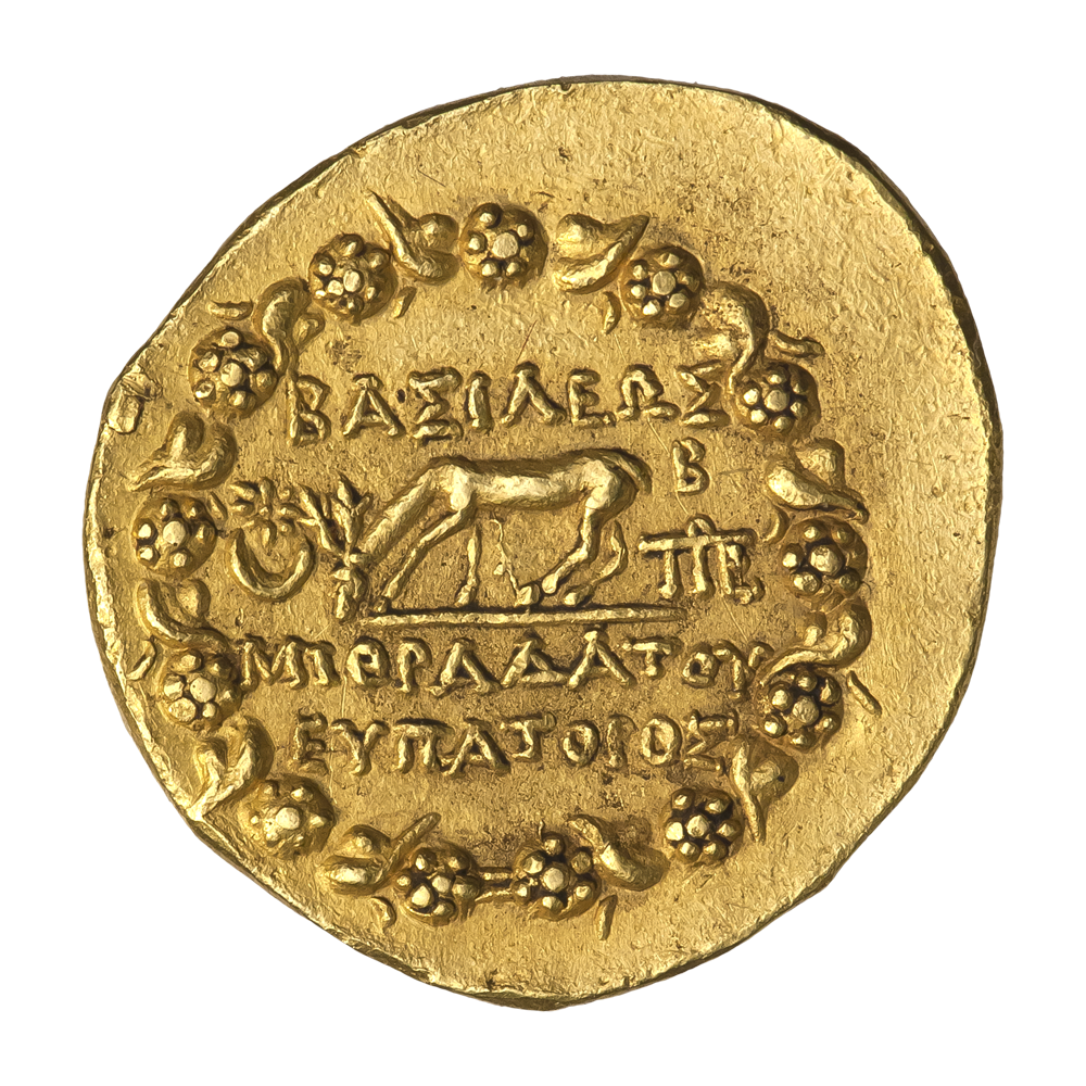 Понтийское царство. Пергам. Митридат VI Евпатор (120—63 гг. до н.э.). Статер. Ок. 87—88 гг. до н.э. Реверс. Надпись ΒΑΣΙΛΕΩΣ ΜΙϴΡΑΔΑΤΟϒ ΕΥΠΑΤΟΡΟΣ. Пасущаяся внутри венка из плюща лань, влево. Слева от лани звезда над полумесяцем, справа — Β (дата) и монограмма Пергама.